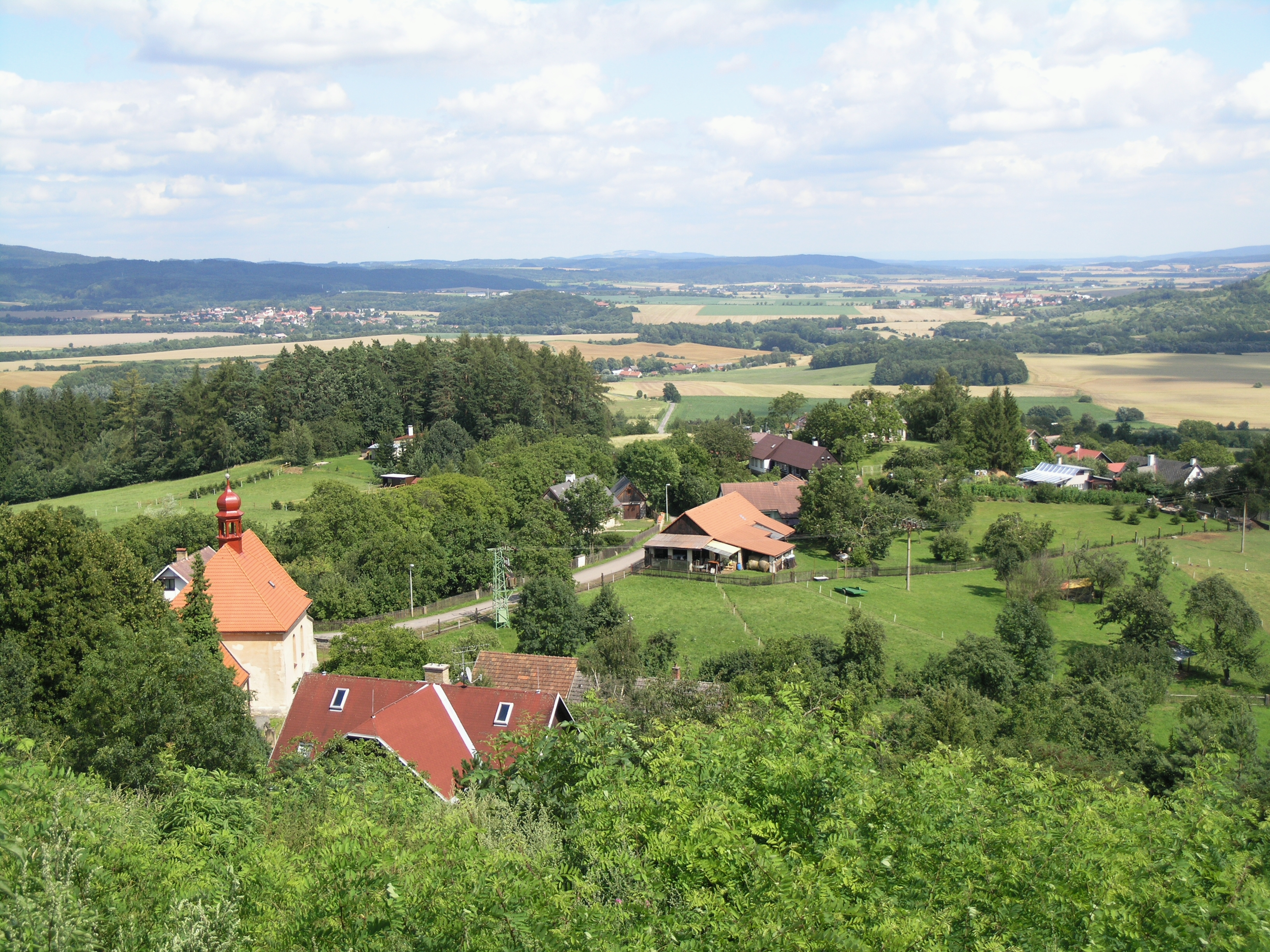 Výhled z vrchu Brada